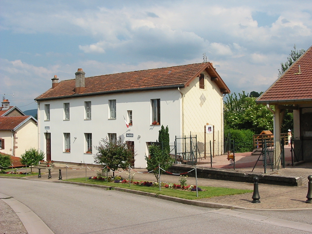 Beauménil dans le département des Vosges : la mairie-école.